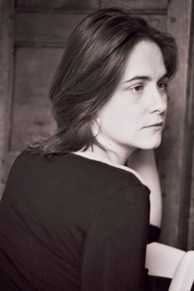 Comédienne Auteur Metteur en scène